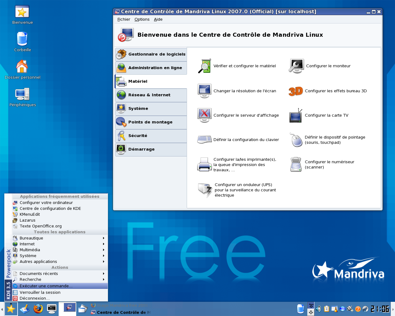 Mandriva 2007 et KDE 3.5